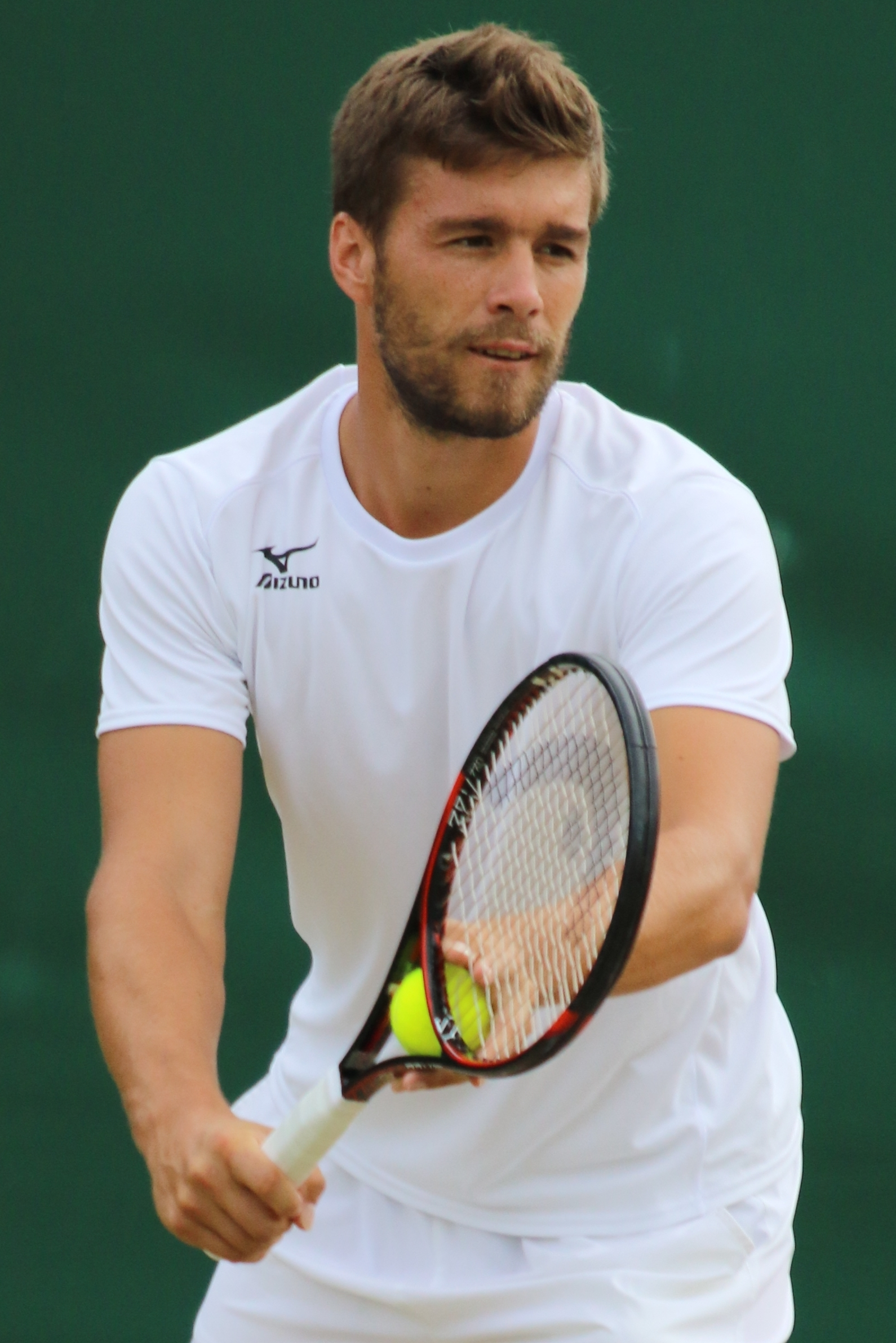 Mektic WM17 (30)